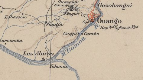 extrait de la carte de la Mission Marchand. Haut-Oubangui-Bahr el Ghazal, Nil, Ethiopie Djibouti / Baratier,... ; Carte publiée sous les auspices de la Société de géographie de Paris ; dressée et dessinée par le, commandant